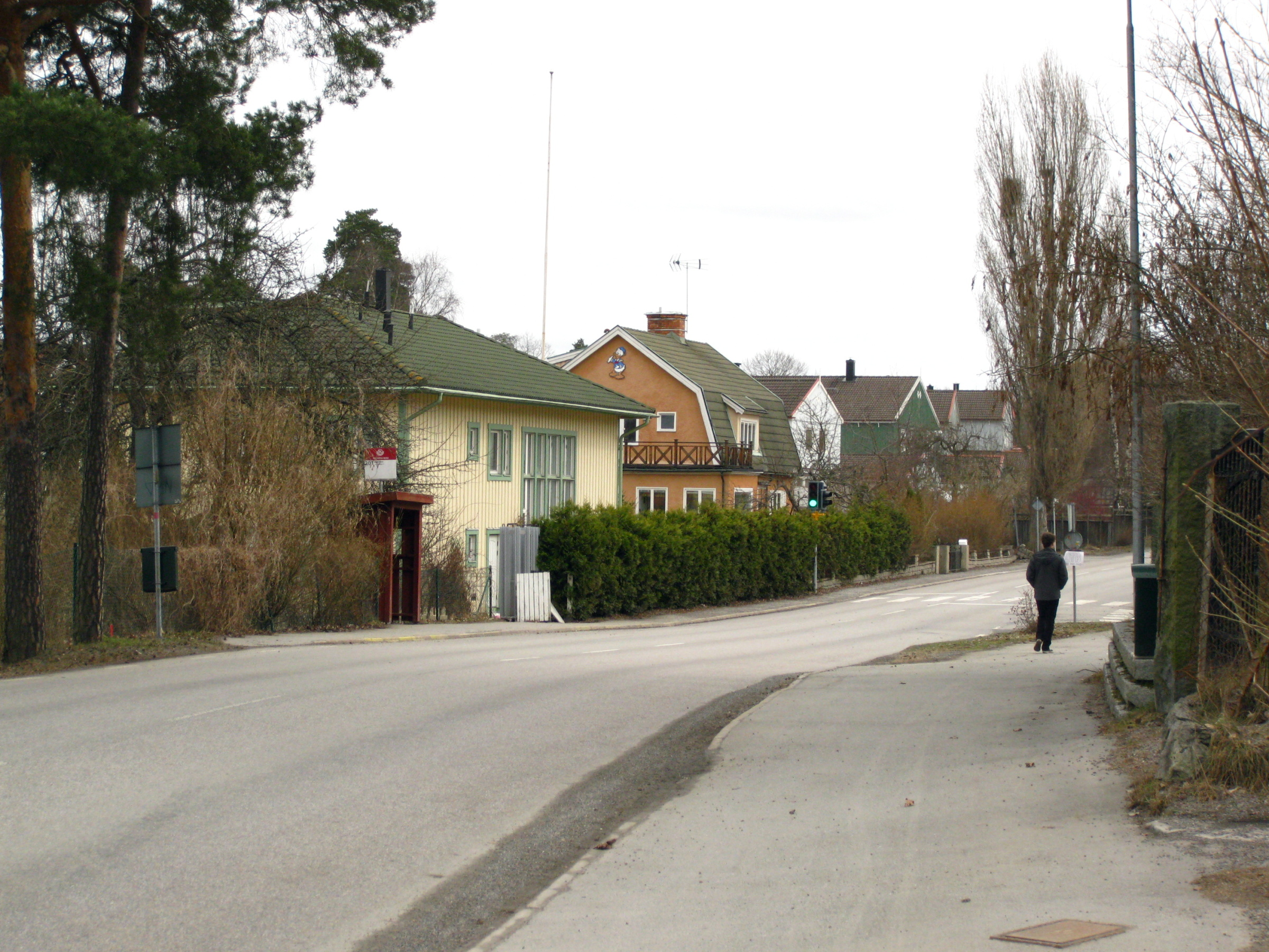 Kottlavägen, Kottla, Lidingö, Stockholm.